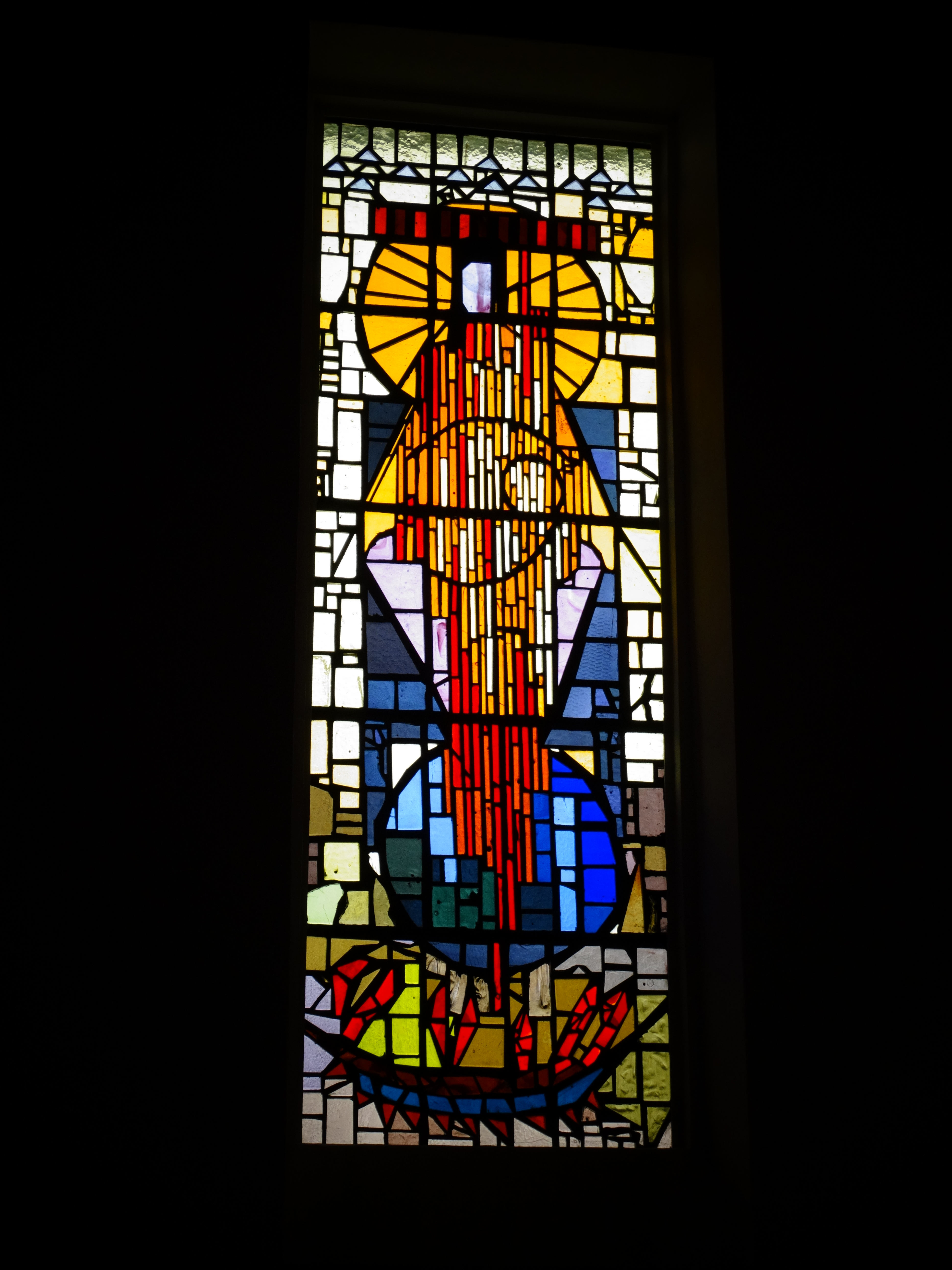 Fenster der St. Konradkirche